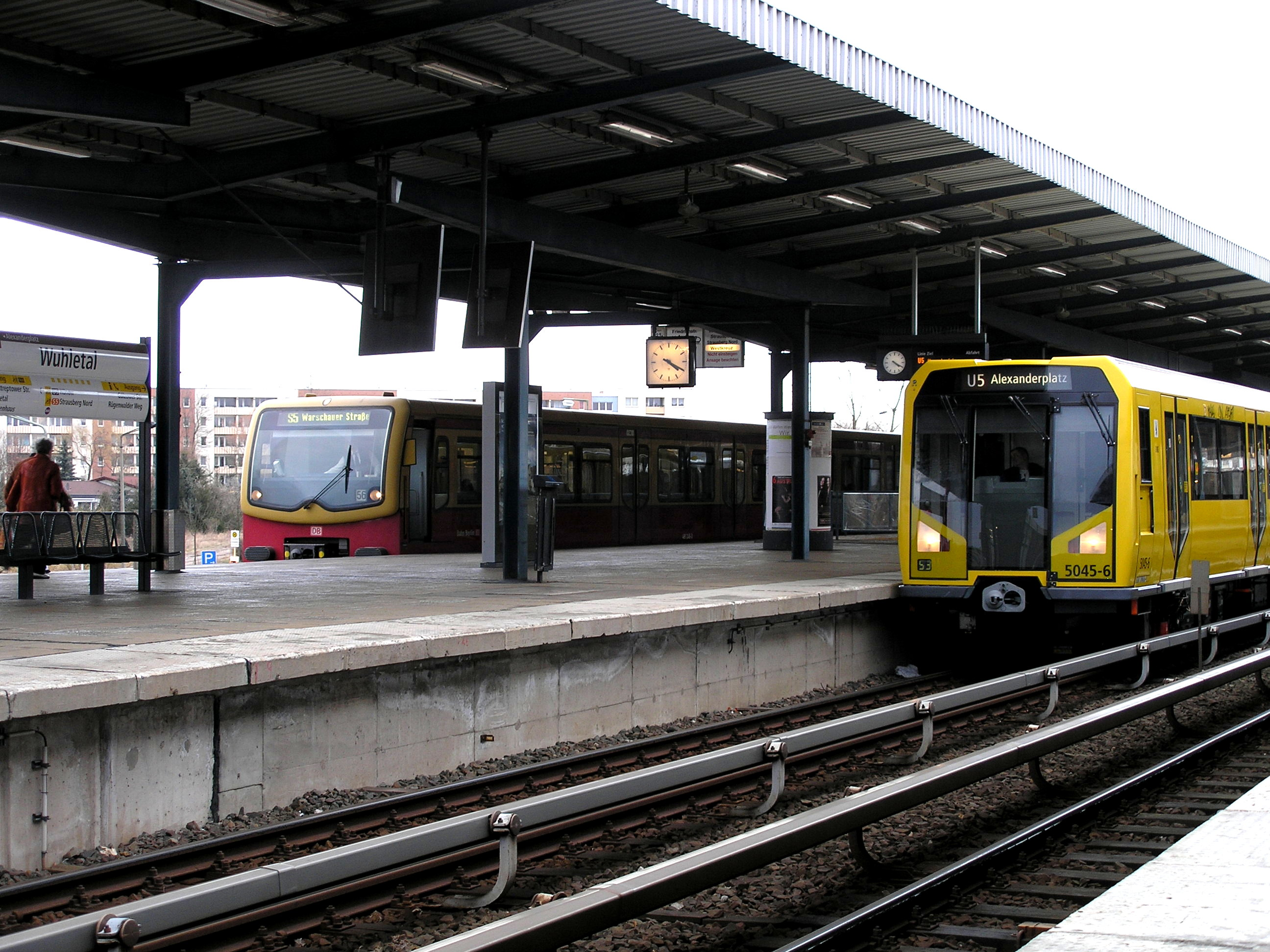 Berliner S- und U-Bahn treffen sich am Bahnhof Wuhletal, links die DB-Baureihe 481 auf der Linie S5 in Richtung Warschauer Straße, rechts die BVG-Baureihe H auf der Linie U5 in Richtung Alexanderplatz, ungewöhnlich der Halt am gemeinsamen Bahnsteig – aufgenommen vom gegenüberliegenden (südlichen) Bahnsteig, von dem die Züge in die Gegenrichtung abfahren